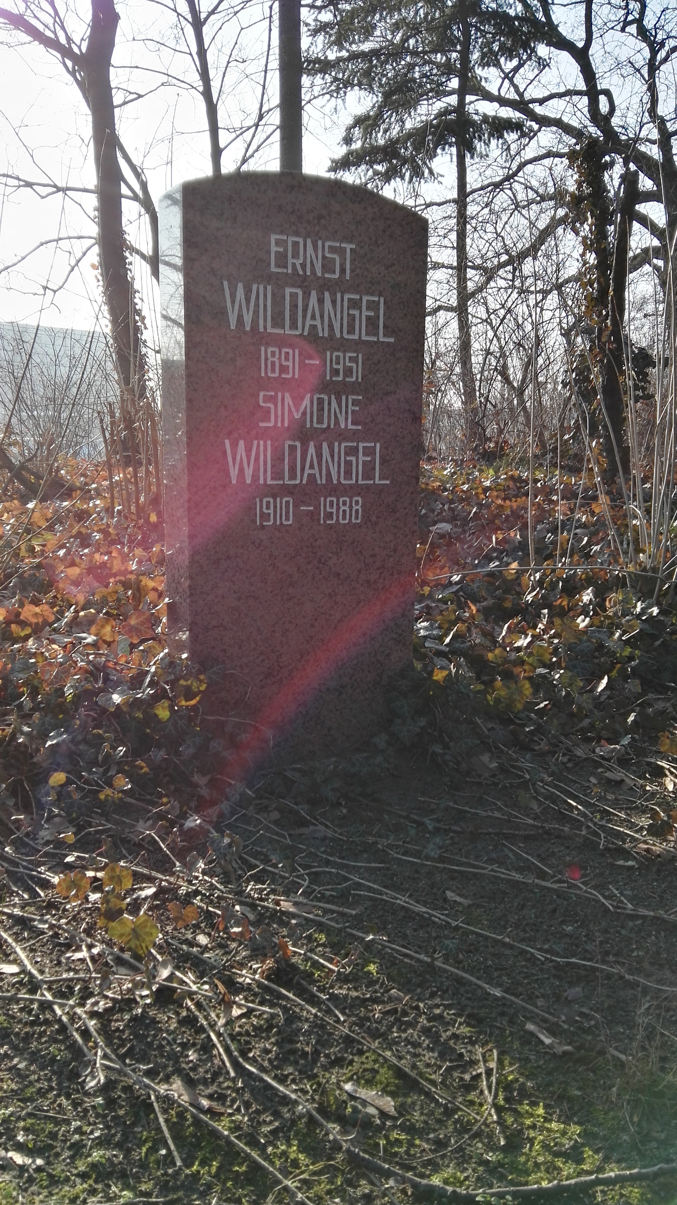 Grab von Ernst Wildangel und Simone Wildangel in der Grabanlage Pergolenweg auf dem Sozialistenfriedhof des Zentralfriedhofs Friedrichsfelde